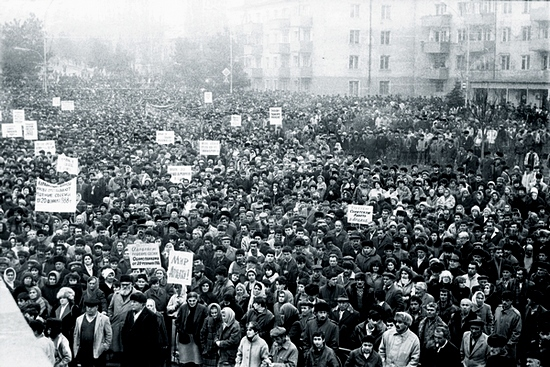 Փետրվարի 13, 1988